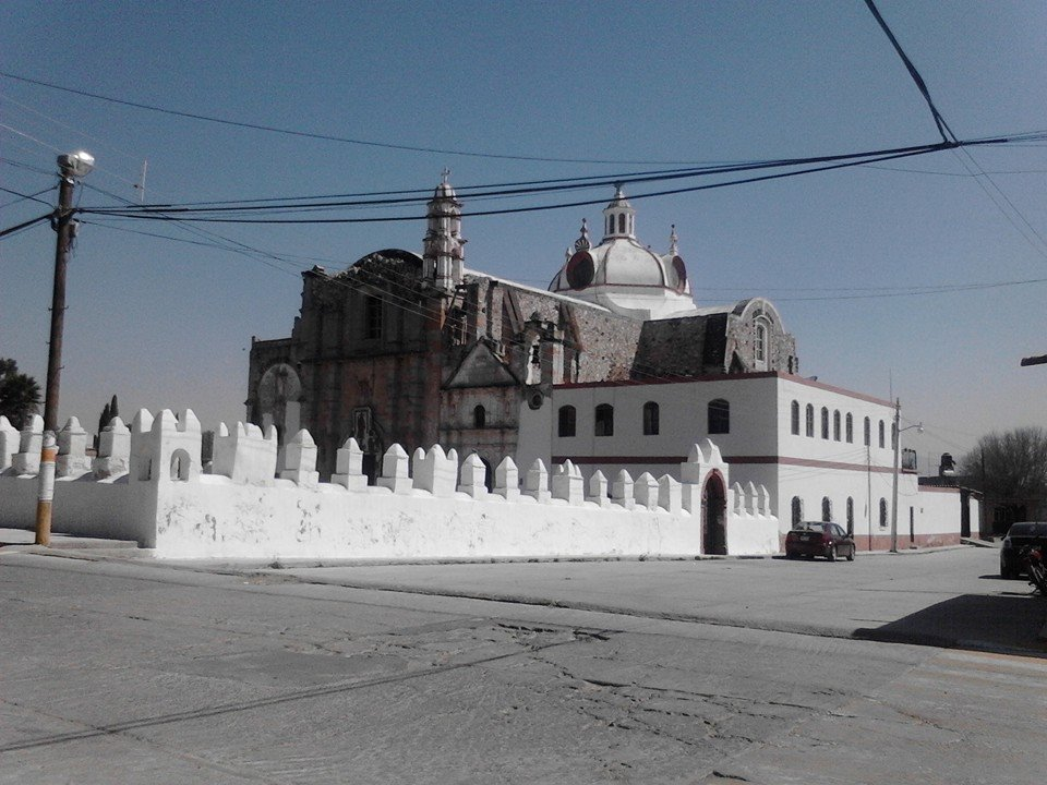 Templo de San Salvador